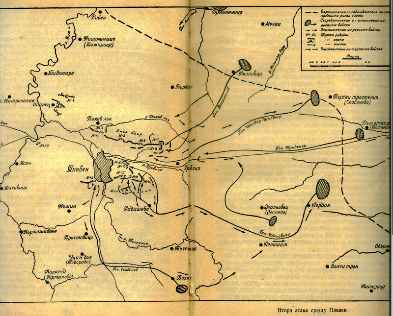 схема на втората атака на Плевен-30.07.1877г.